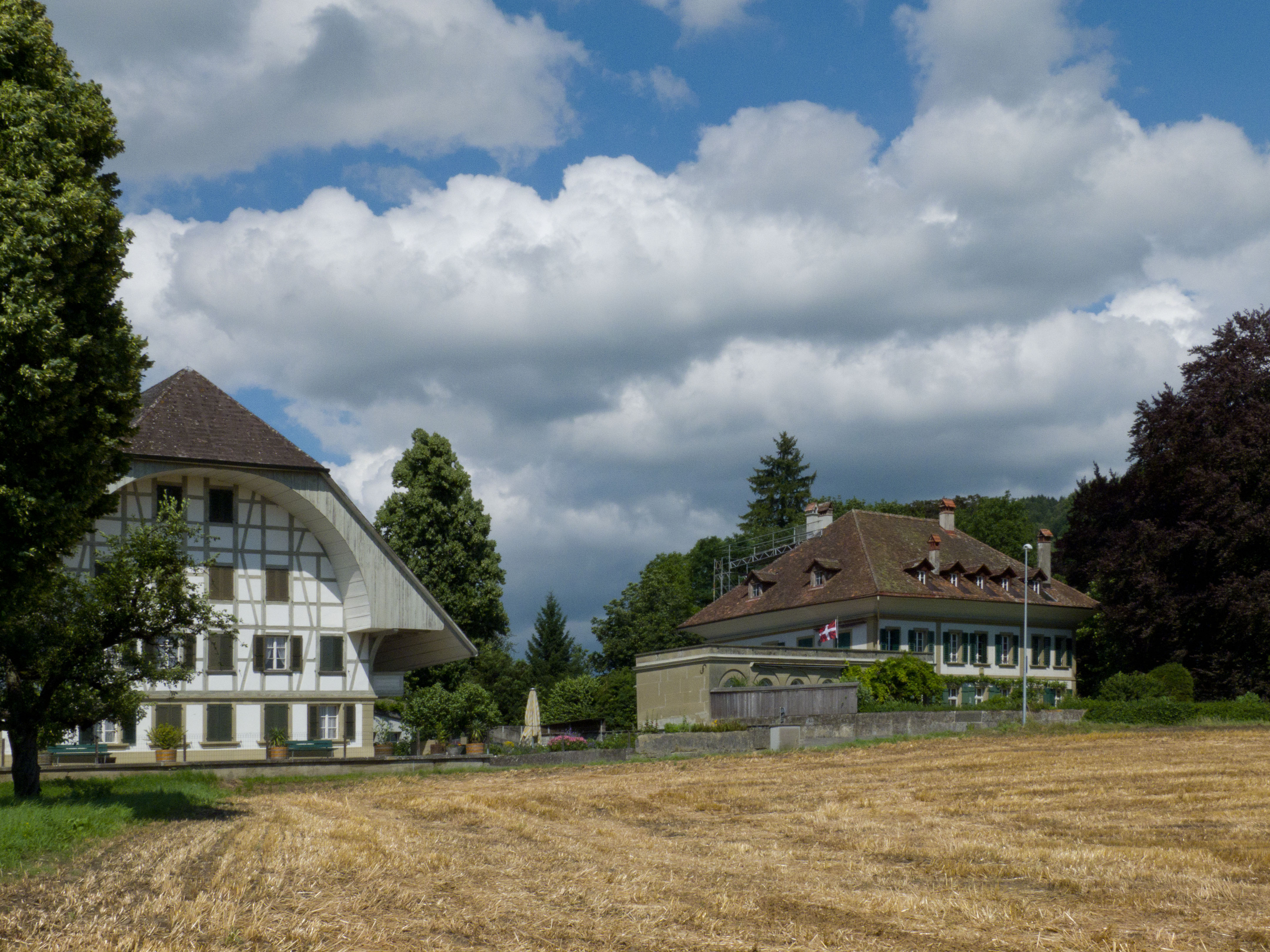 Campagne Hubelgut, auch als Schloss Habstetten bekannt, mit Bauernhaus im Ort Habstetten bei Bolligen